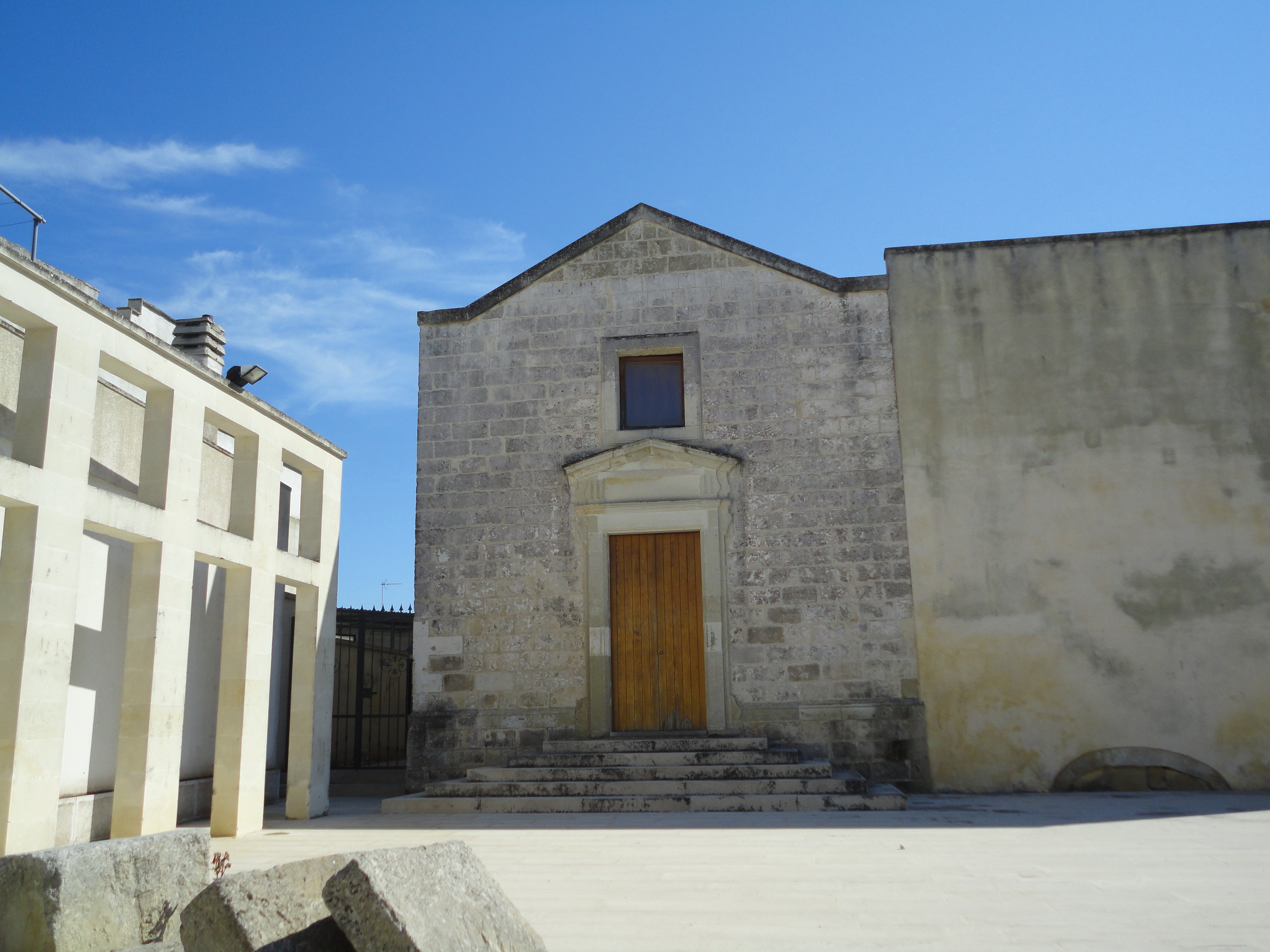 Esterno cripta san Salvatore Giurdignano